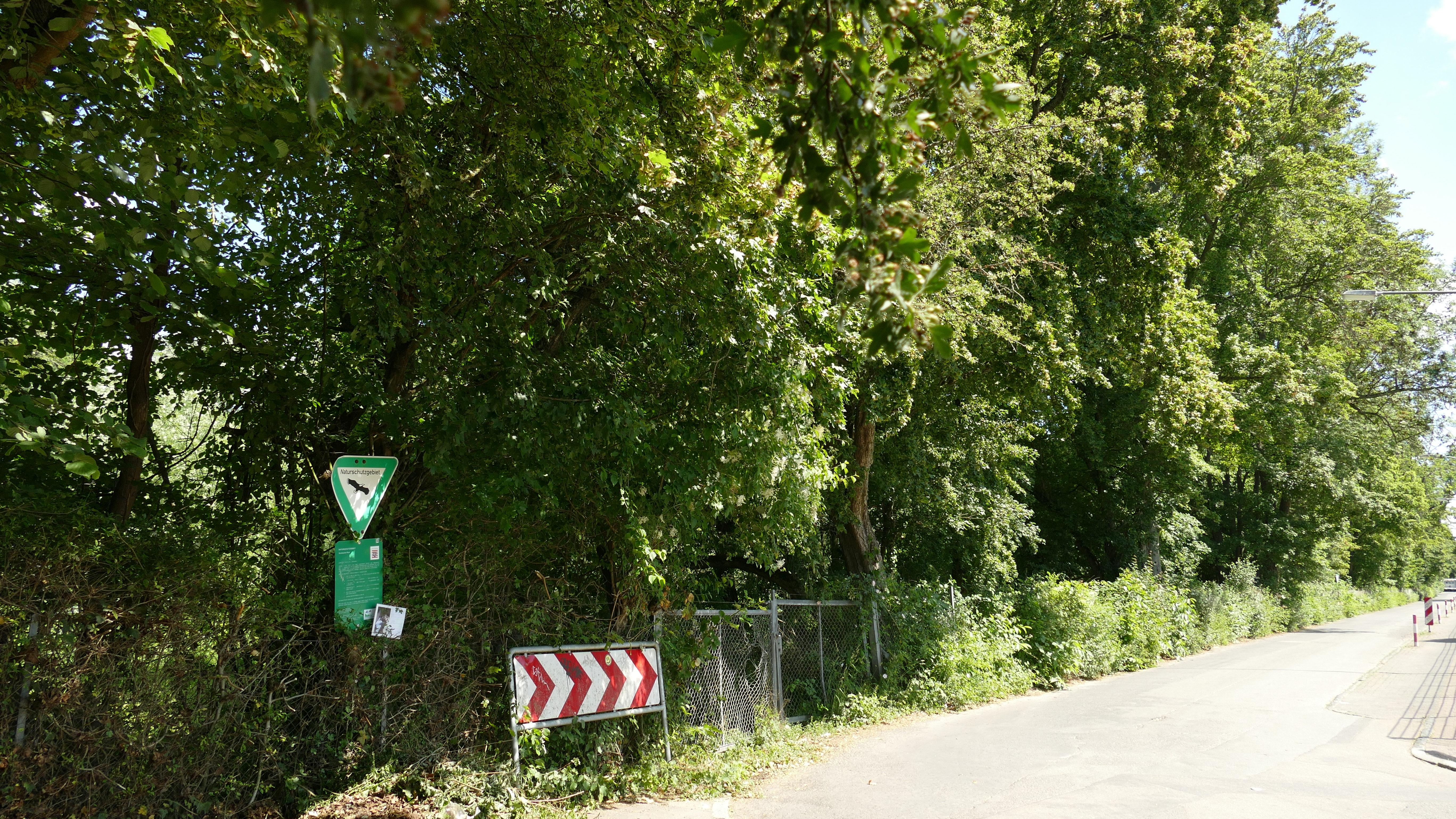 Naturschutzgebiet Seckbacher Ried in Frankfurt/Main, Südseite